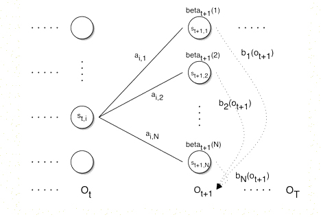 شکل5: احتمالات پسرو